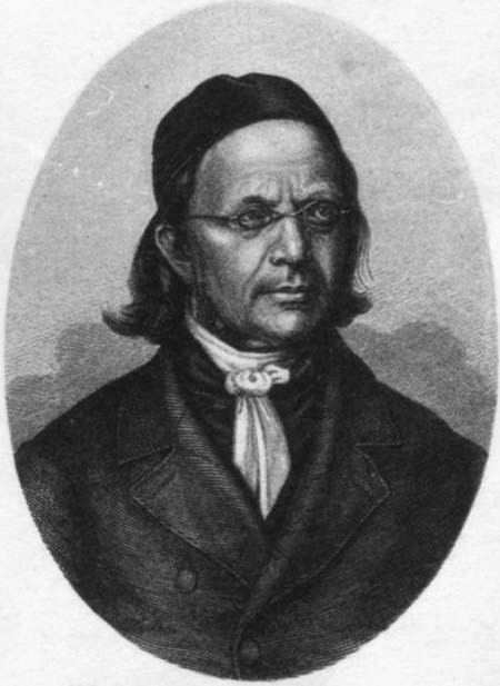 Porträt von Christian Gottlob Barth.